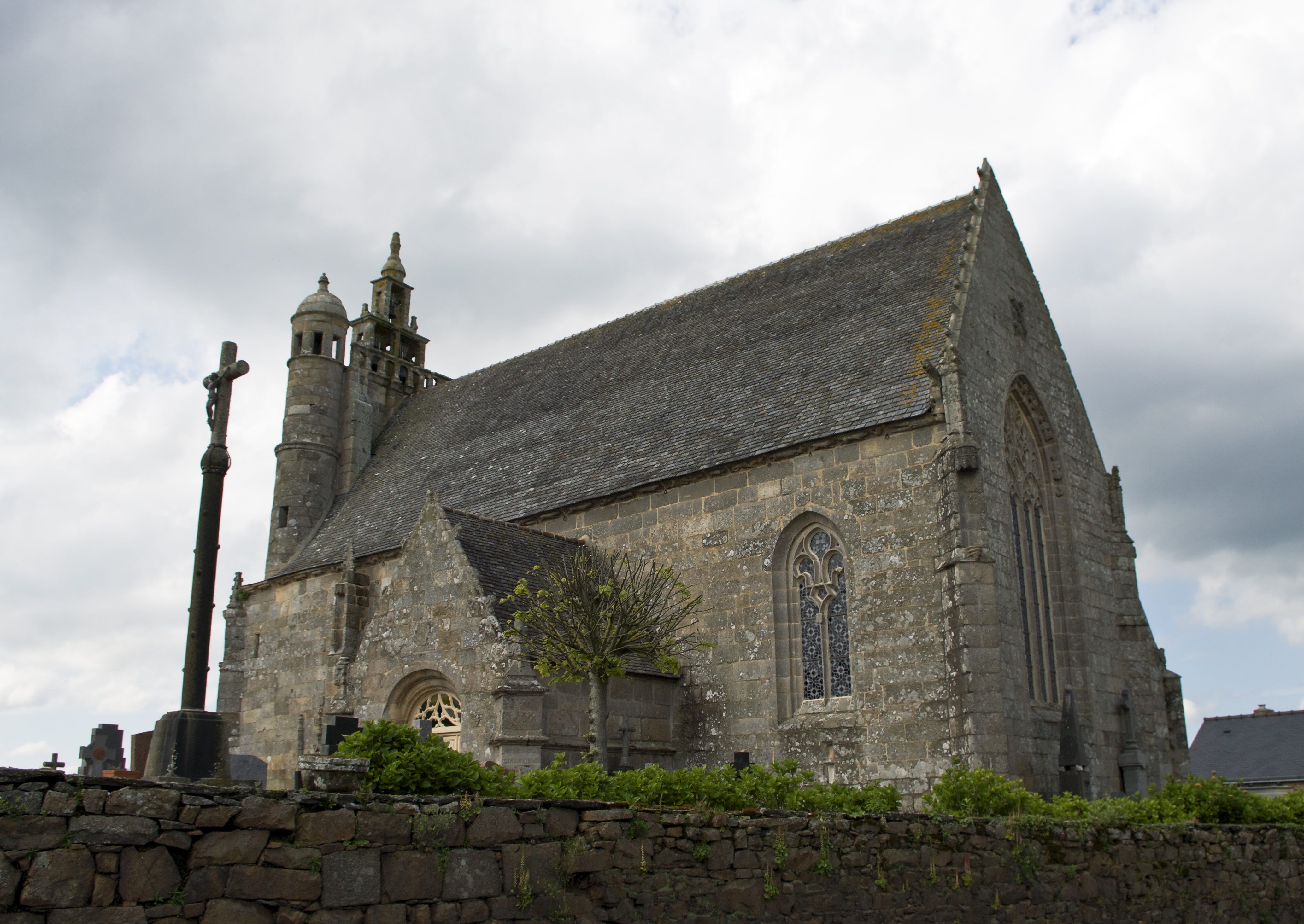 Chapelle Notre-Dame-de-Comfort est situé dans la commune de Berhet, dans le département français des Côtes d'Armor